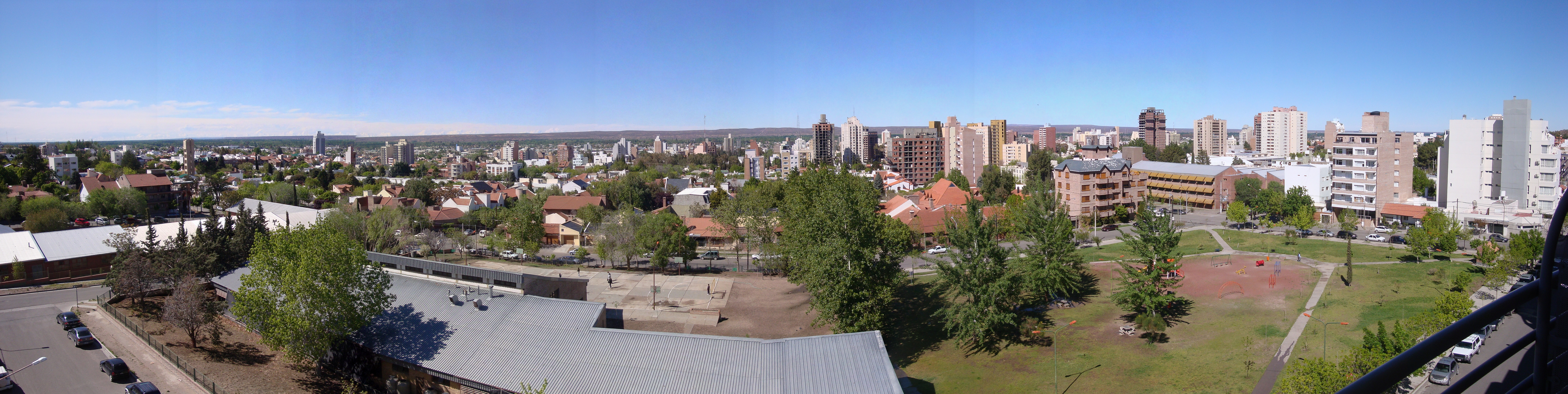 Panoramica de la ciudad de Neuquén.